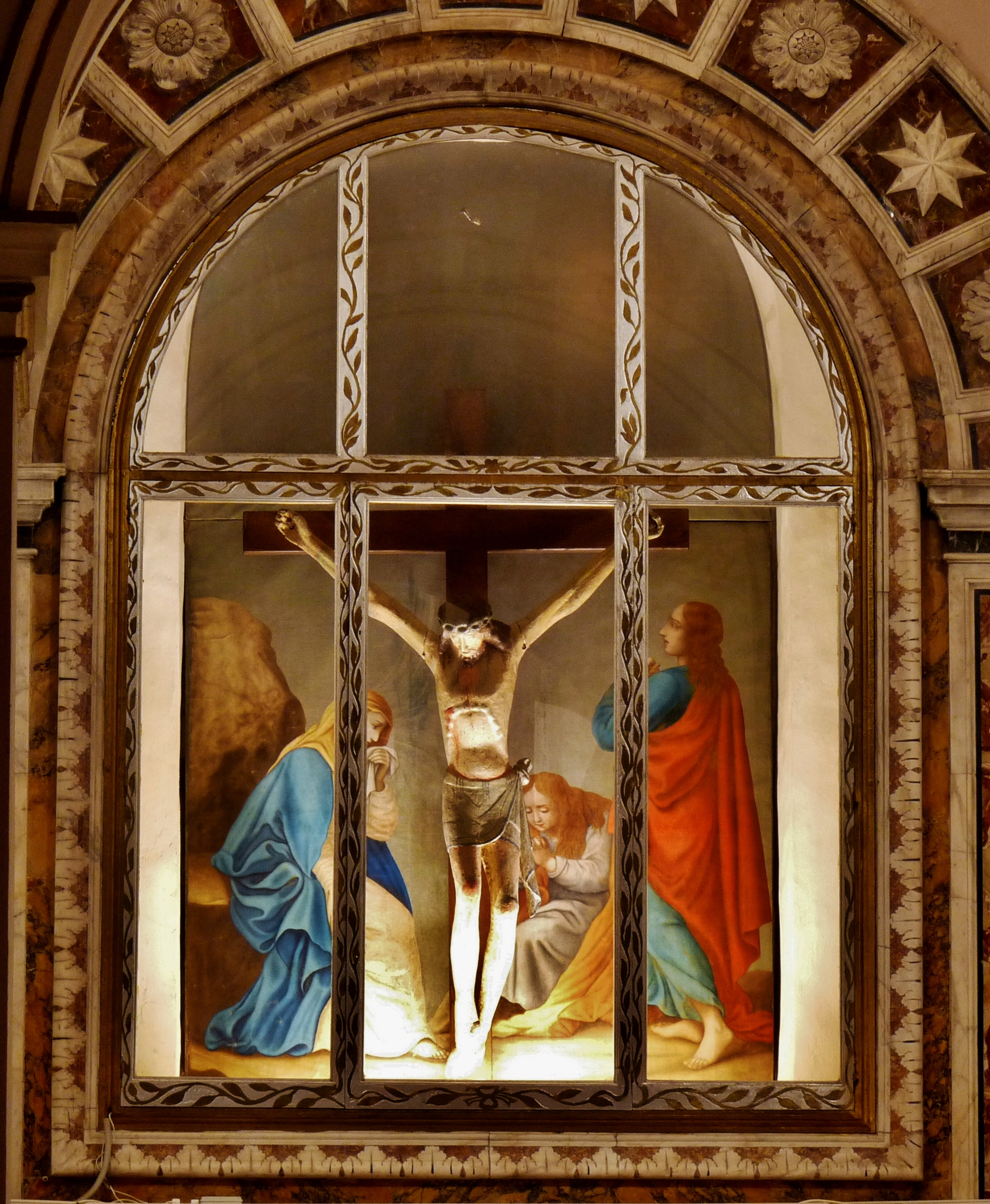 Altare dedicato al Crocifisso miracoloso nella Collegiata Santissima Maria Assunta di Ceglie Messapica (BR), navata sinistra. Crocifisso ligneo XVI secolo